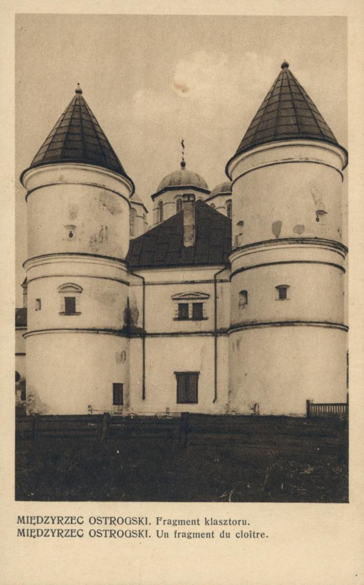 Межиріцький монастир від півночі.